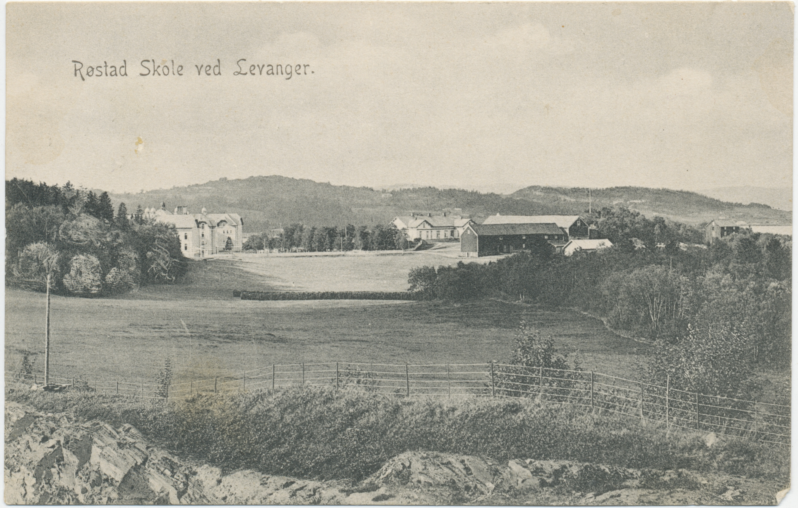 Røstad skole ved Levanger. Bildet er tatt senest i 1909. Fotograf / Photographer: Ukjent Fotoeier / Photo owner: Johannes Naavik Digitalisering / Digitizing: Arne Langås (2009) Foto-ID / Photo ID: 043-0566 Hvis bildet gjengis i andre sammenhenger, oppgi Åsen Museum og Historielag, fotoeier og fotograf som kildereferanse. Har du utfyllende opplysninger? Legg gjerne igjen en kommentar nedenfor eller send e-post til . | If you re-use this photo, please refer to Åsen Museum og Historielag, the photographer and the owner of the photo. Do you have additional information? Please leave a comment or send an e-mail to .